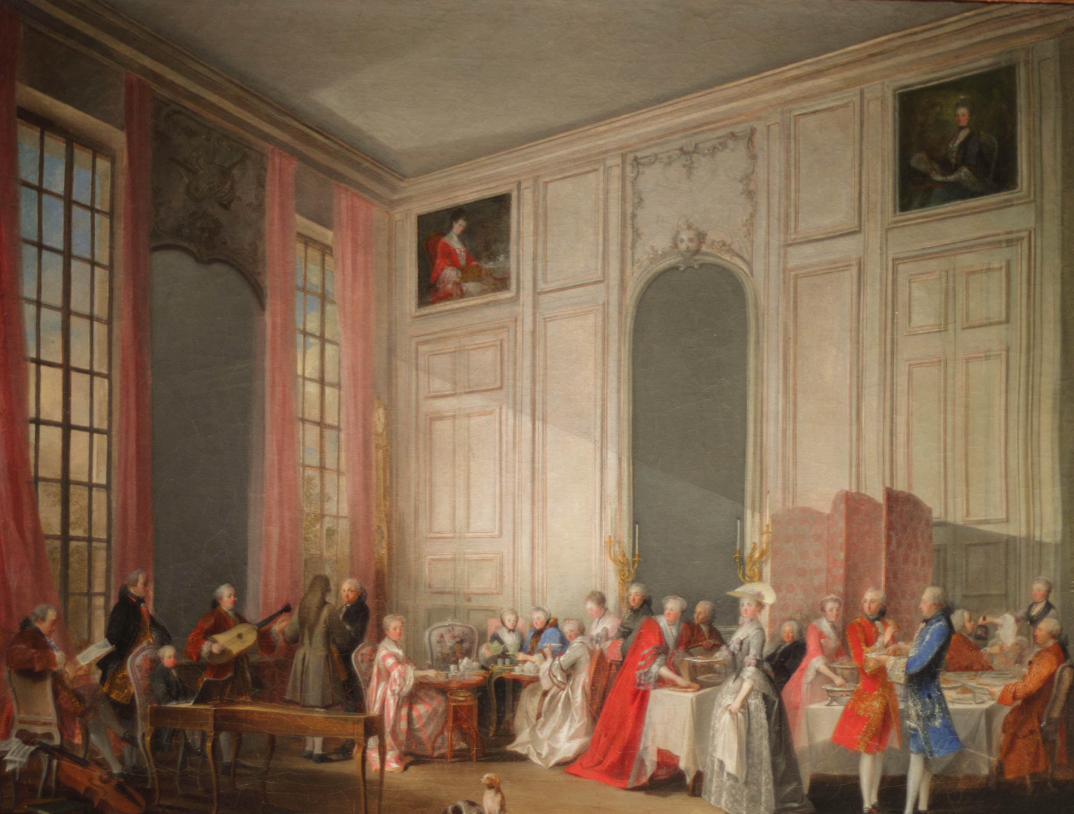 Personnes représentées, de gauche à droite : le prince de Beauvau, assis, lisant une brochure ; le chevalier de la Laurency, gentilhomme du prince, debout derrière le jeune Mozart au clevecin ; Pierre de Géliottte (Jélyotte), debout, jouant de la guitarre ; le prince de Conti, de dos, debout près de Trudaine ; Mademoiselle Bagarotti, chanteuse, assise devant un guéridon ; la maréchale de Mirepoix versant du thé à madame de Vierville; la maréchale de Luxembourg derrière laquelle se tient sa petite-fille mademoiselle de Boufflers (future duchesse de Lauzun, puis de Biron), debout, de profil. Le prince de Hénin, debout, appuyant la main sur le dossier de la chaise de la maréchale de Luxembourg ; la comtesse d’Egmont mère, vétue de rouge ; monsieur Pont-de-Veyle appuyé sur le dossier d’un fauteuil ; la comtesse d’Egmont la jeune, née Richelieu, tenant une serviette et portant un plat ; le président Hénault, vetu de noir, assis devant un paravent ; la comtesse de Boufflers se servant d’un plat ; le comte de Chabot mangeant un gâteau et son frère le comte de Jarnac tenant un plat ; le mathématicien d’Ortous de Mairan, assis, la princesse de Beauvau lui servant à boire ; le bailli de Chabrillant, assis. [2]